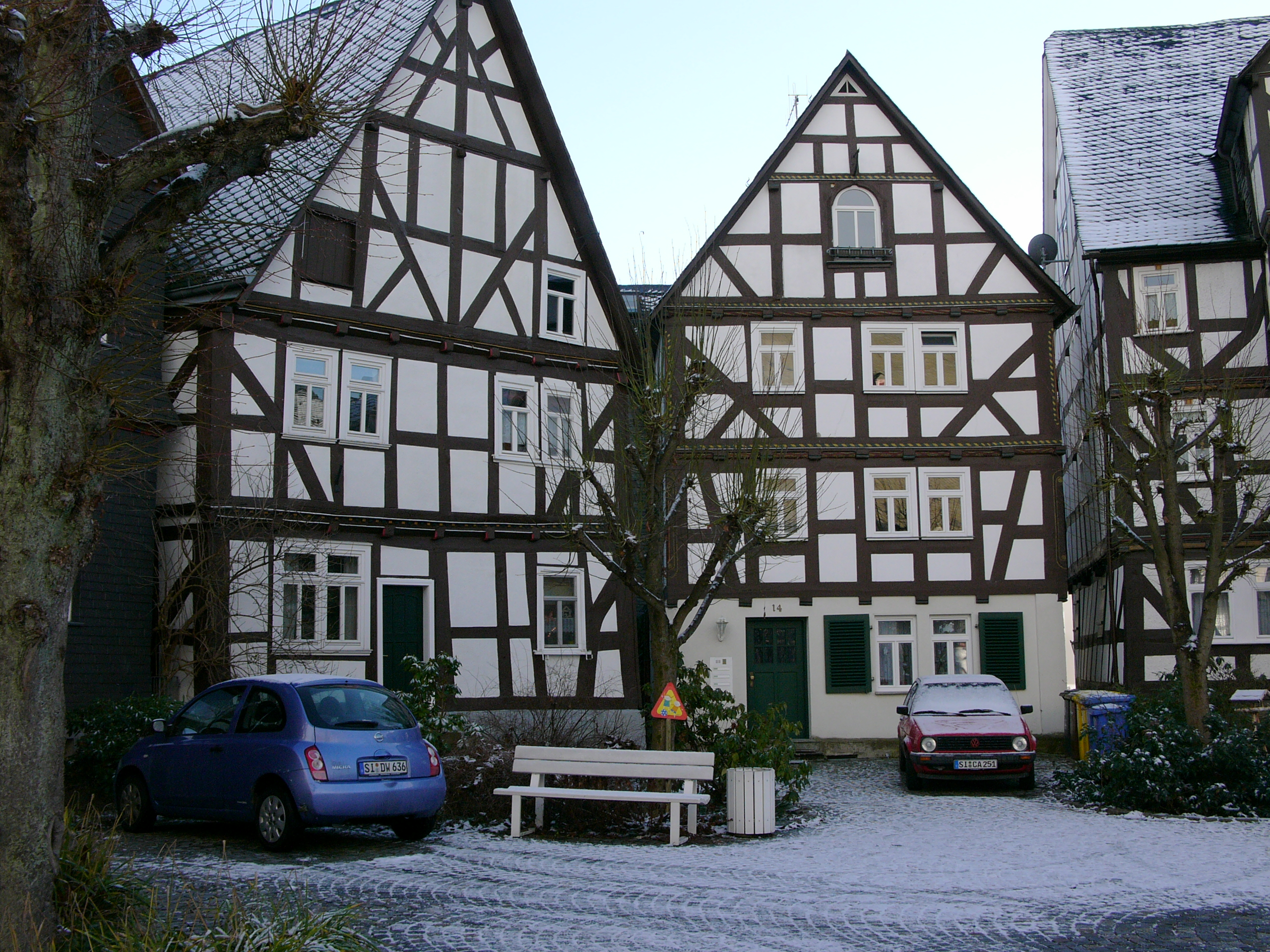 Fachwerkhäuser von etwa 1685 am Kirchplatz in Bad Laasphe (Nr. 14 - 18, von rechts), Foto 2005